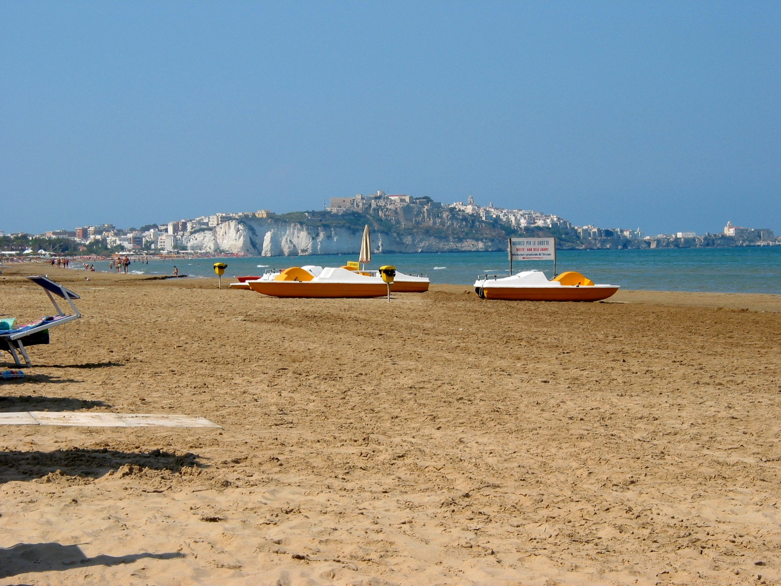 Vieste, Puglia, ItaliaVieste, Gargano, beach